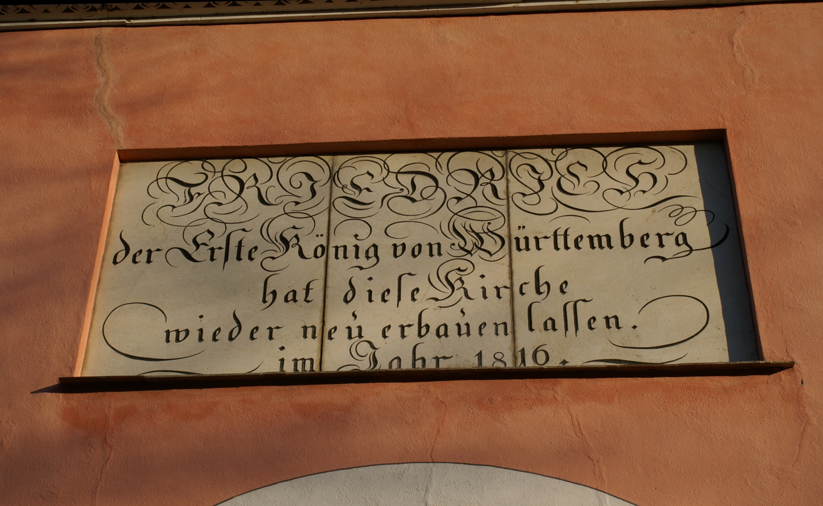 Bauinschrift am Turm der Katholischen Kirche St. Andreas in Herrlingen: Der erste König von Württemberg hat diese Kirche wieder neu erbauen lassen im Jahr 1816